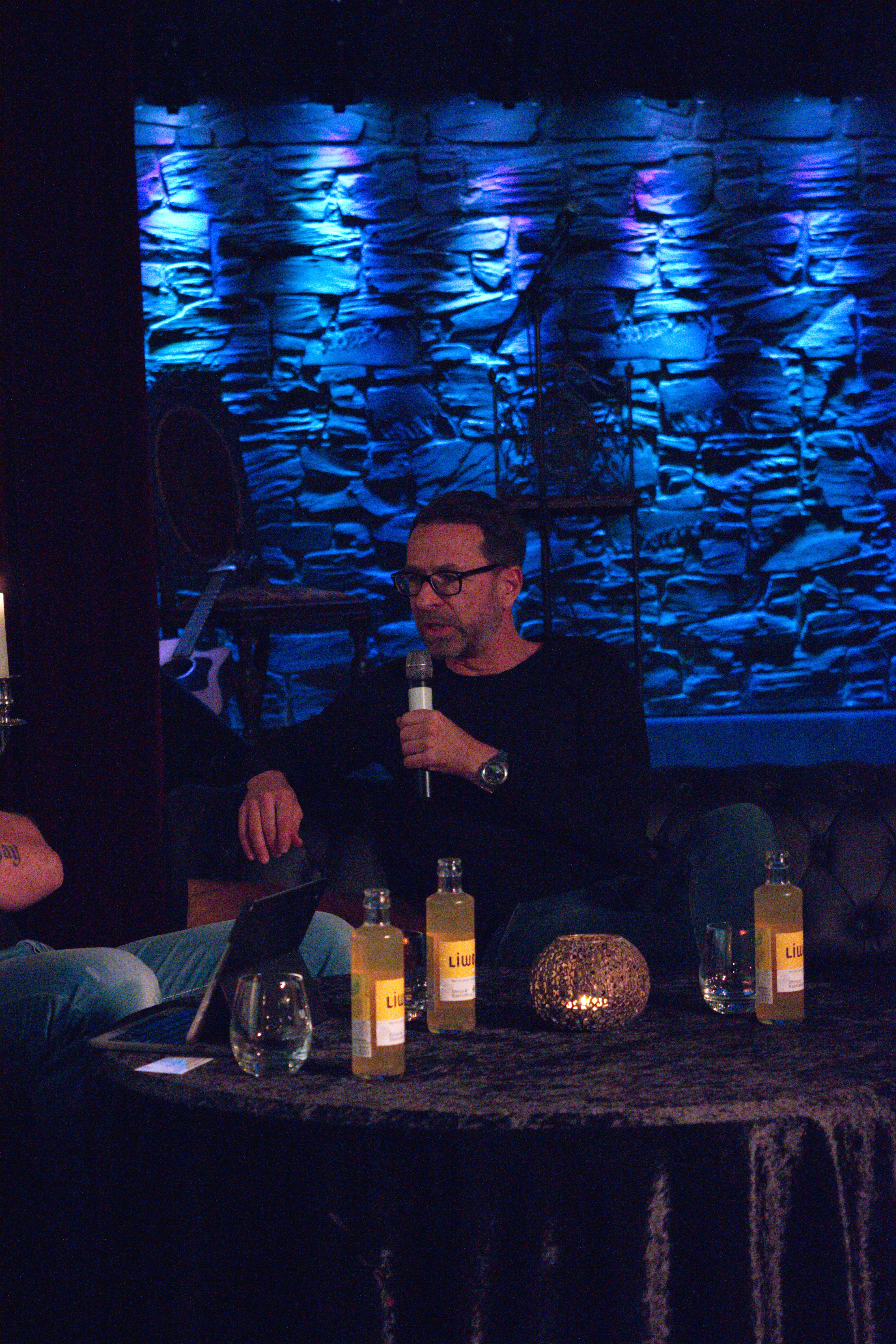 Wuppertal(k) im Kontakthof, Wuppertal